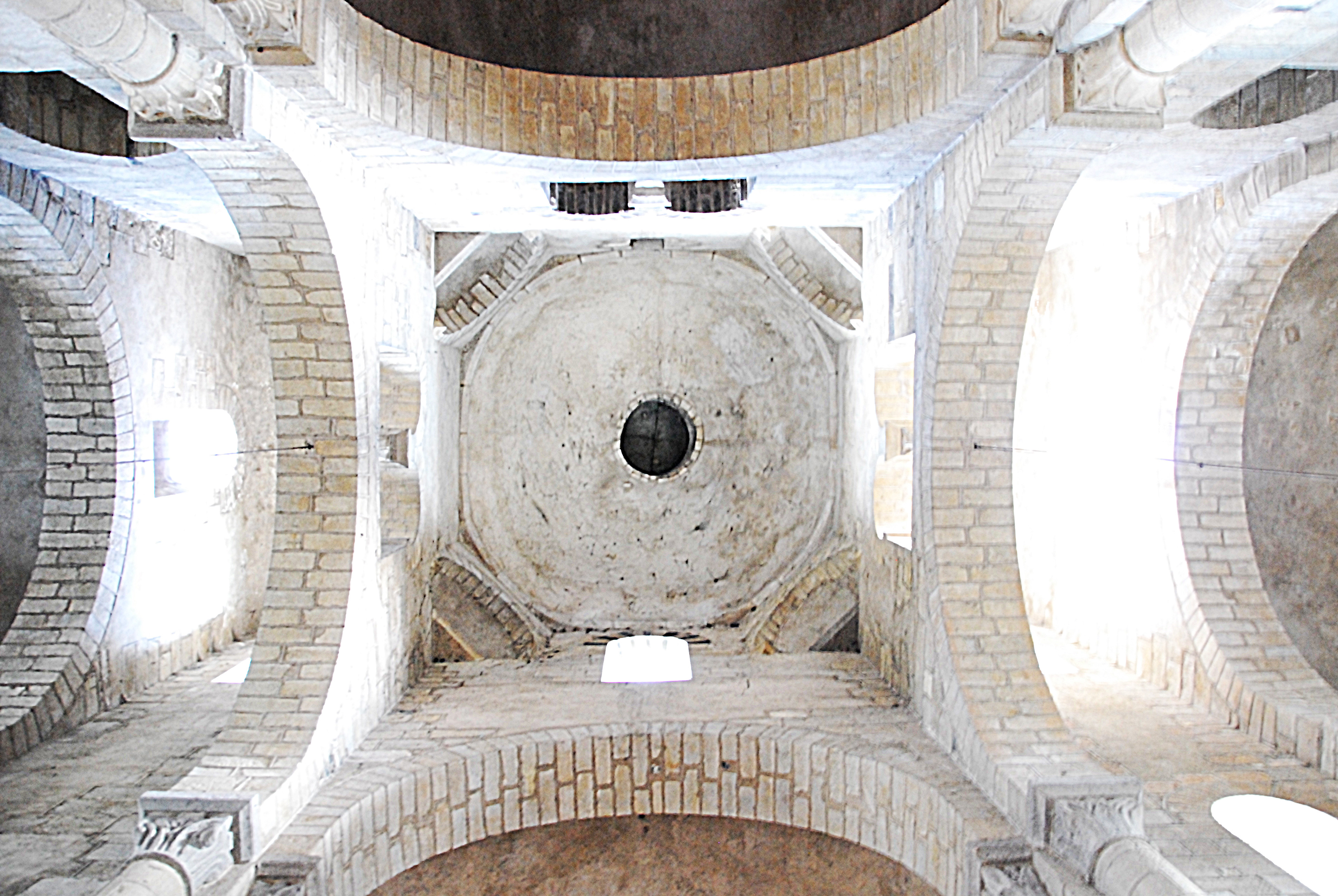 St-Saturnin Puy-de-Dôme), "massif barlong", zentriert von unten